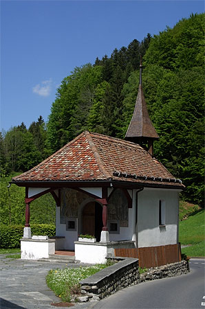 Gedenk-Kapelle im Morgarten